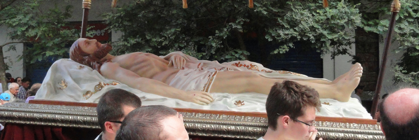 Procissão do Encontro, estátua de Cristo morto criada por Tarquinio Zambelli, pertencente à Catedral.